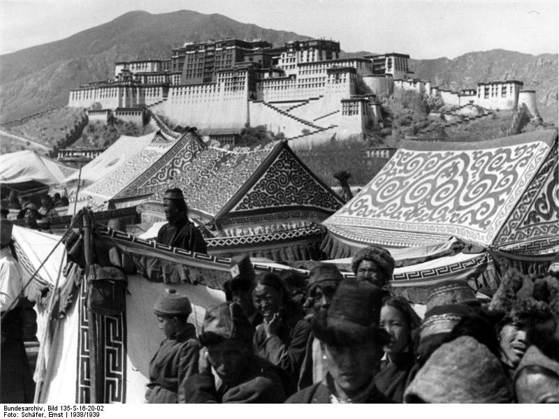 Lhasa-Neujahr-Festzelte vor dem Potala.